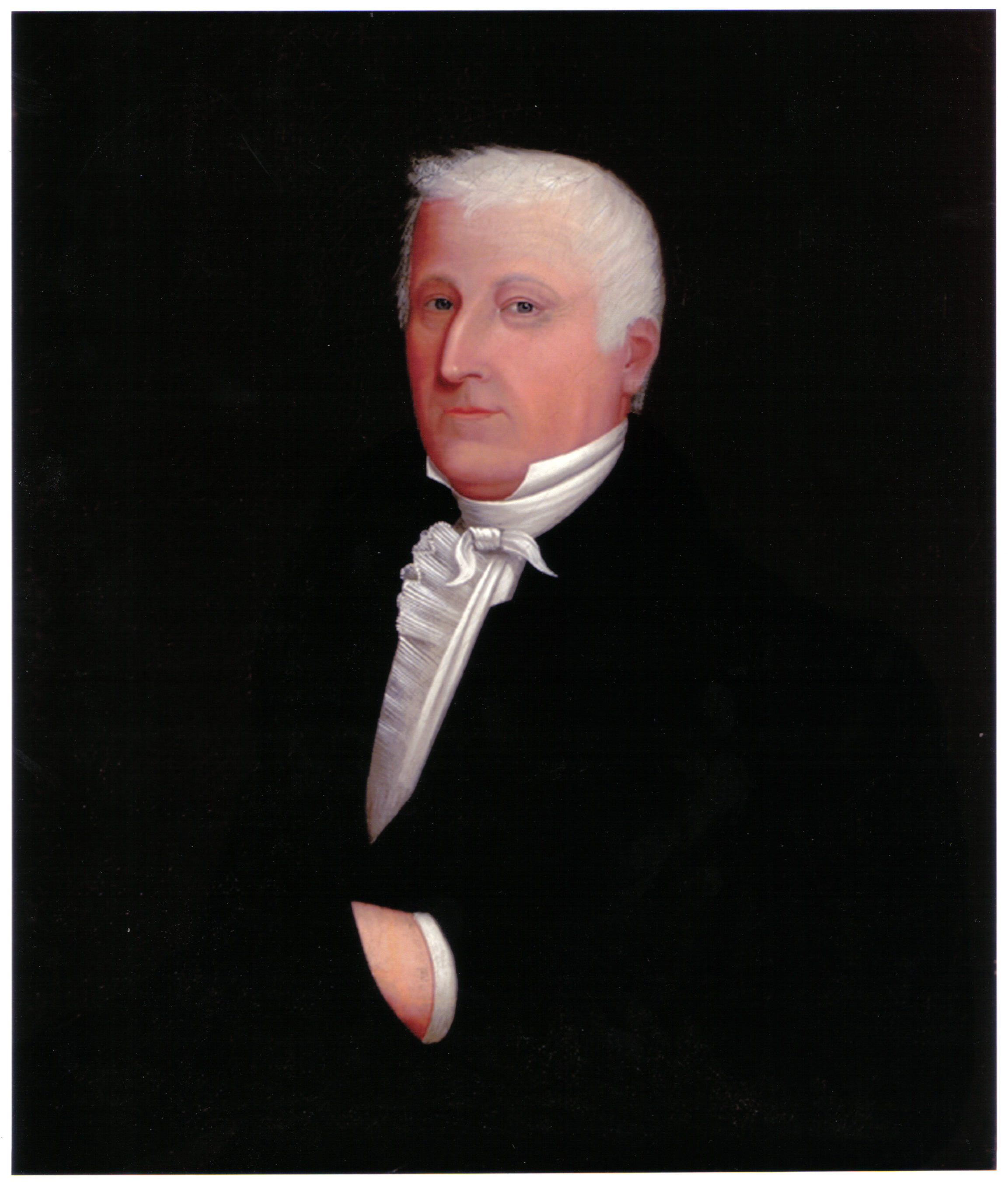 August-Franz Globensky (Glaubenskindt), settled near St-Eustache, Quebec